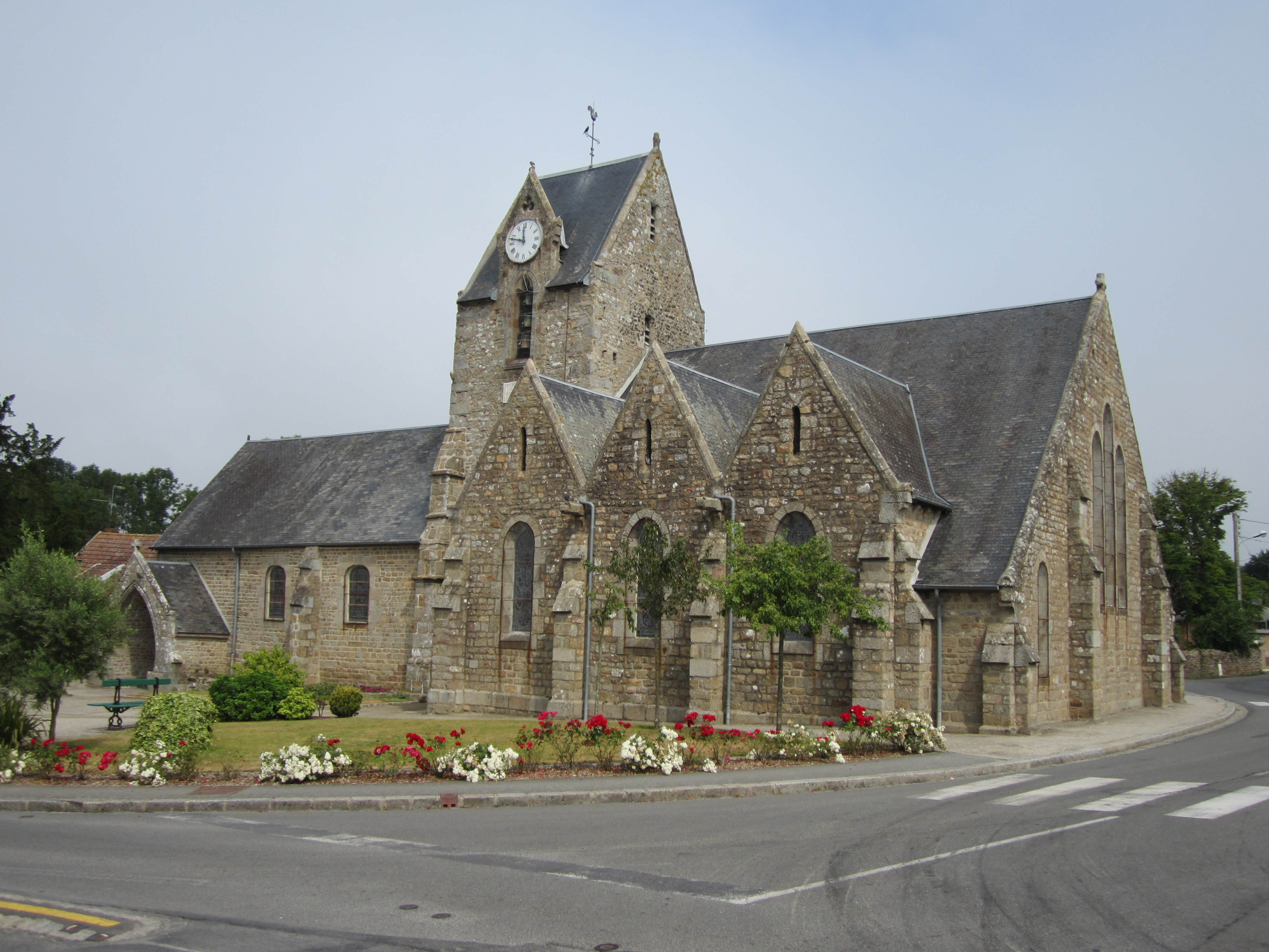 Église Saint-Vigor de Carolles, Manche